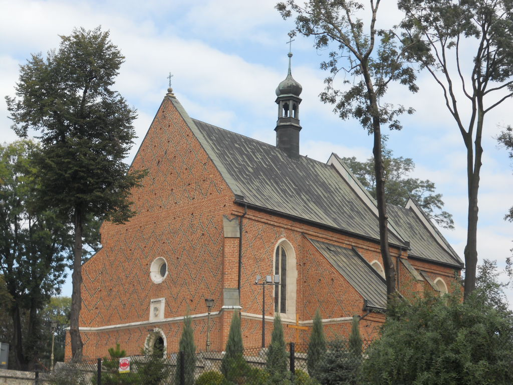 Kościół św. Małgorzaty w podkrakowskich Raciborowicach.